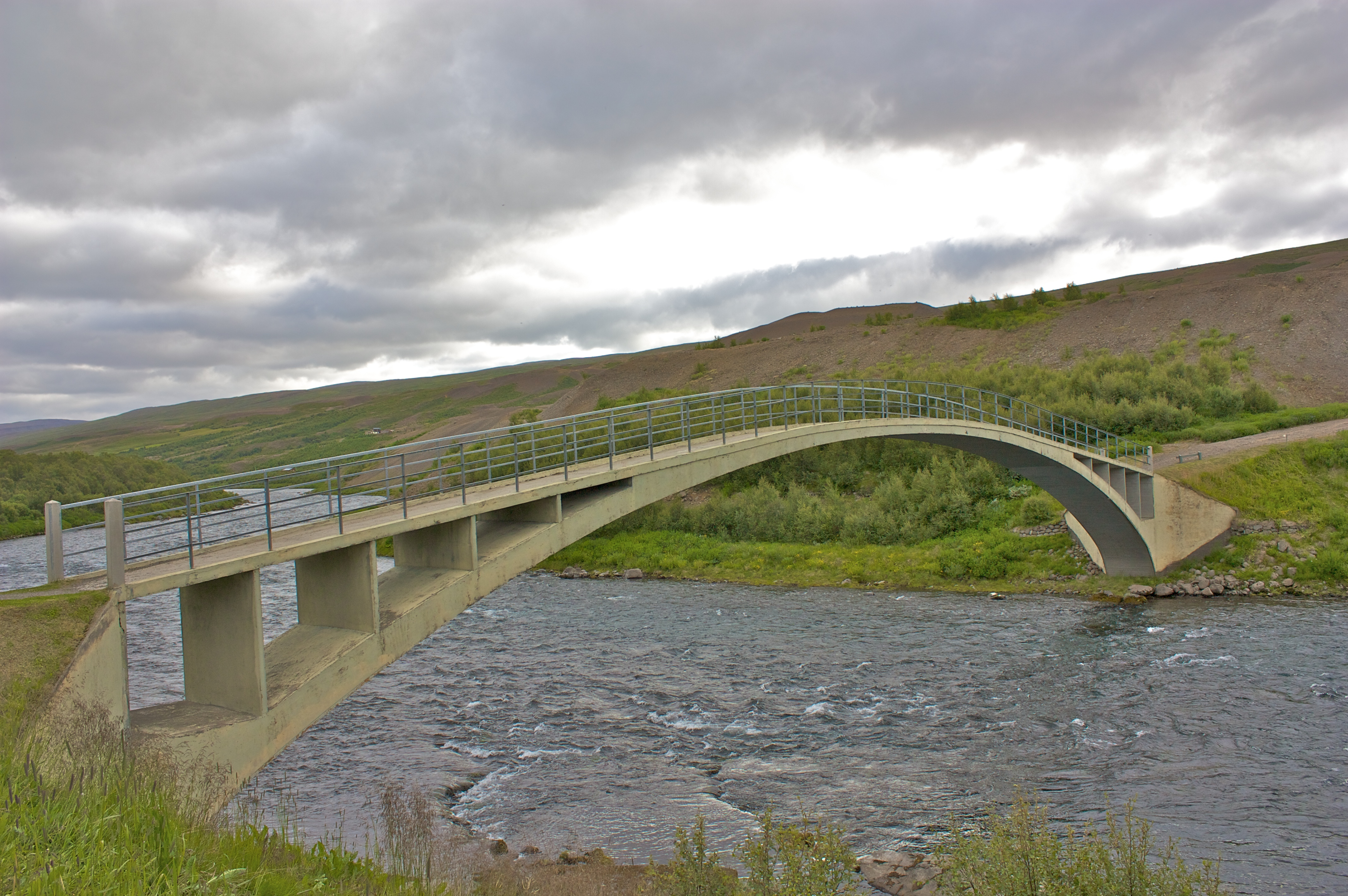 Fnjóskárbrú